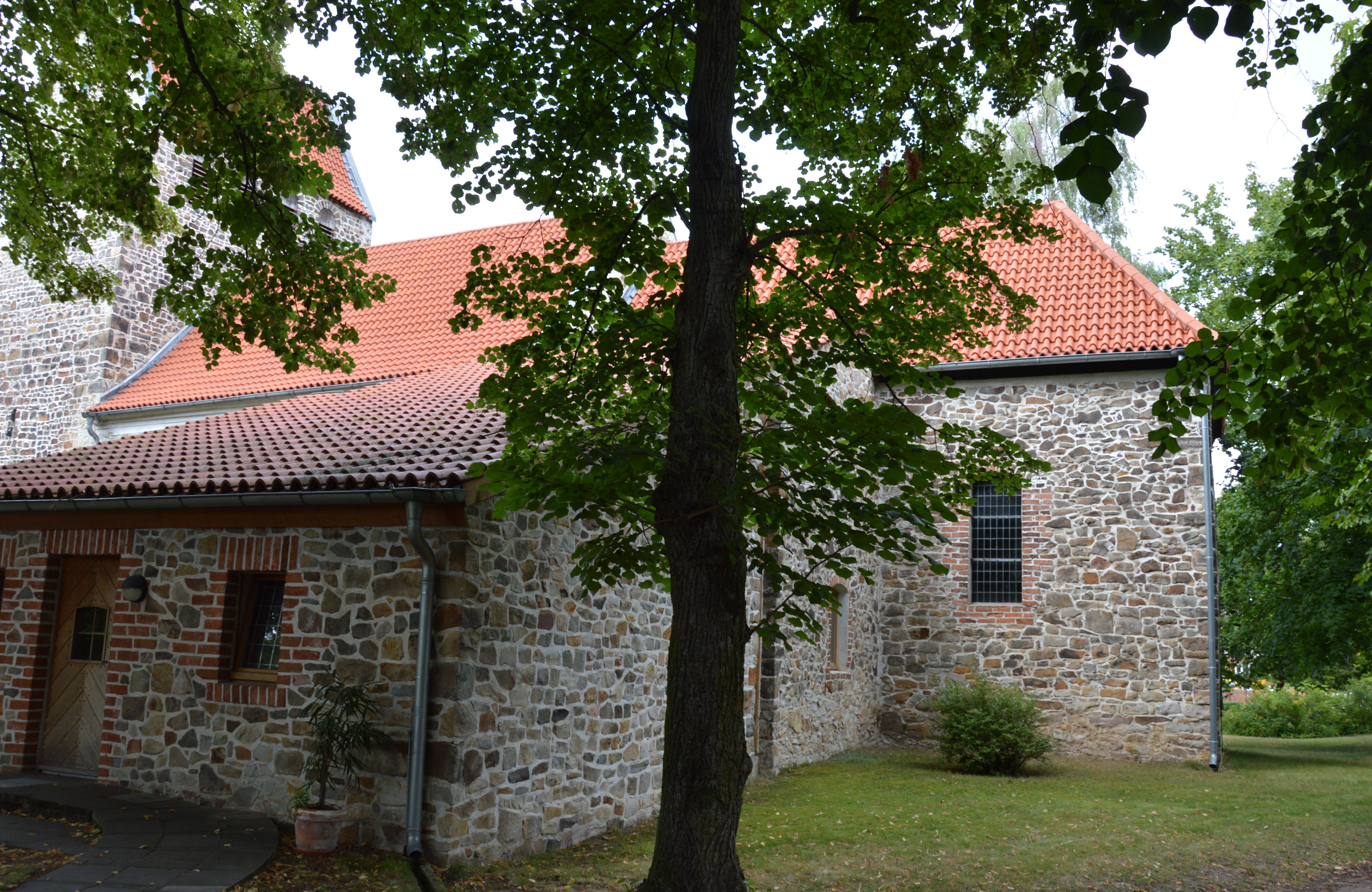 Kirche Plötzky Schiff